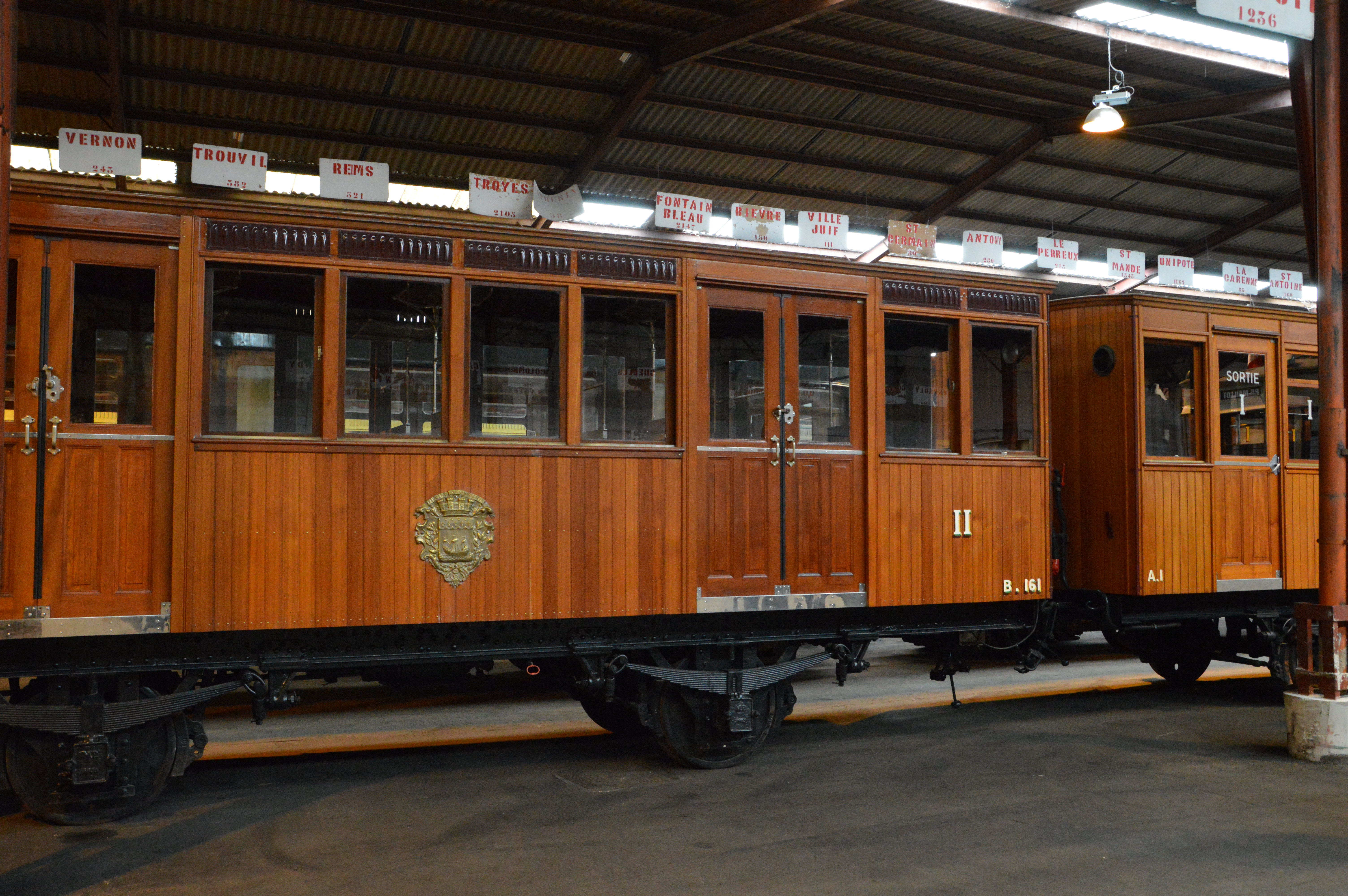 Les rames Westinghouse furent les premières rames du métro parisien. En bois, elles ont notamment connu la catastrophe de Couronnes qui fit 88 morts en 1903. (320R0078)